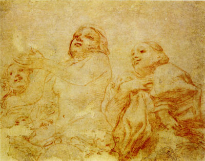 Correggio, studio per eva, collezione privata in USA